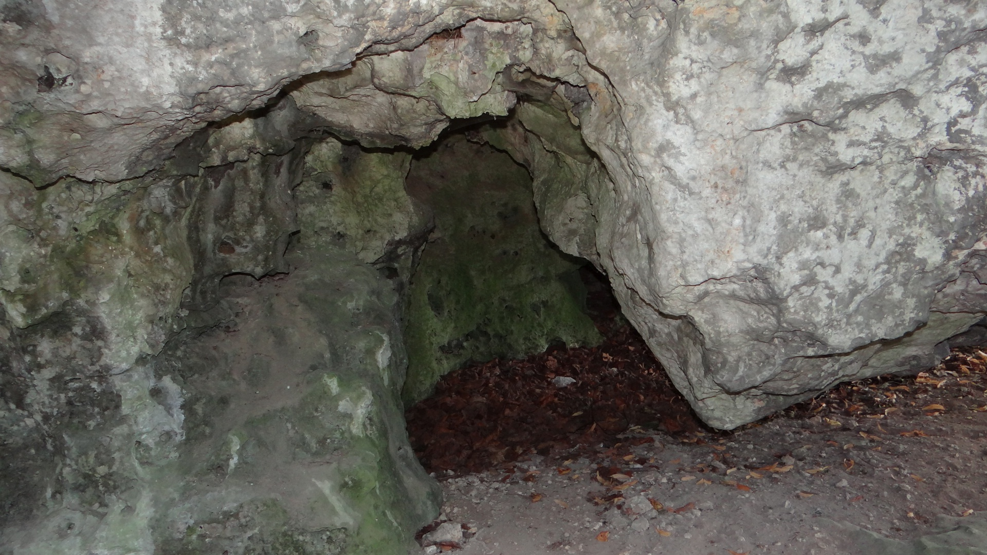 Schronisko w Górze Smoleń VI w Parku Jurajskim